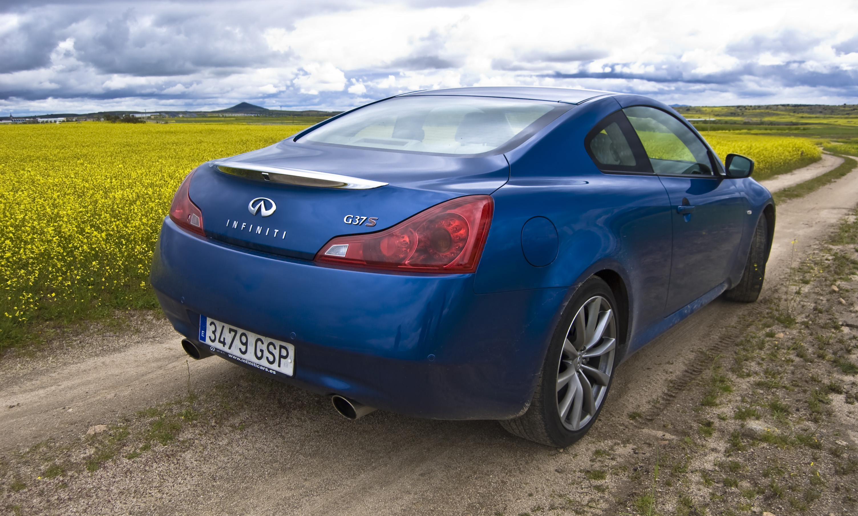 Prueba del Infiniti G37 Coupé S para